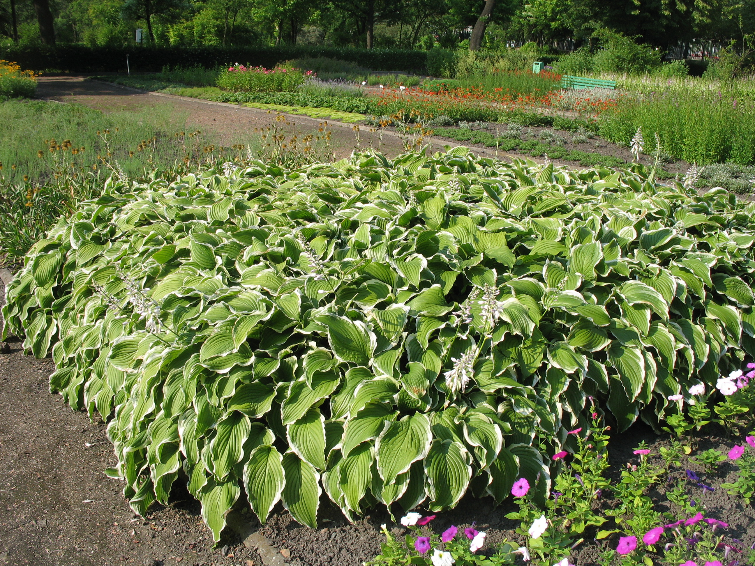 Funkia białobrzeżna (Hosta 'Fortunei Albomarginata'). Zdjęcie wykonane 26.06.2006 w Miejskim Ogrodzie Botanicznym w Zabrzu